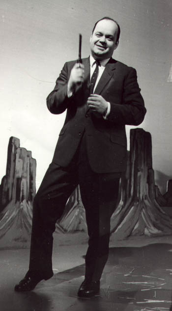 Tage bregður á leik í sjónvarpssal á upphafsárum Sjónvarpsins